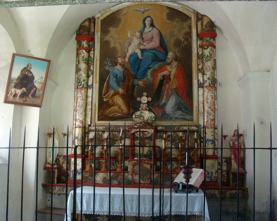 Intérieur de la chapelle des Pétètes : au-dessus de l'autel richement décoré, une Vierge à l'enfant.